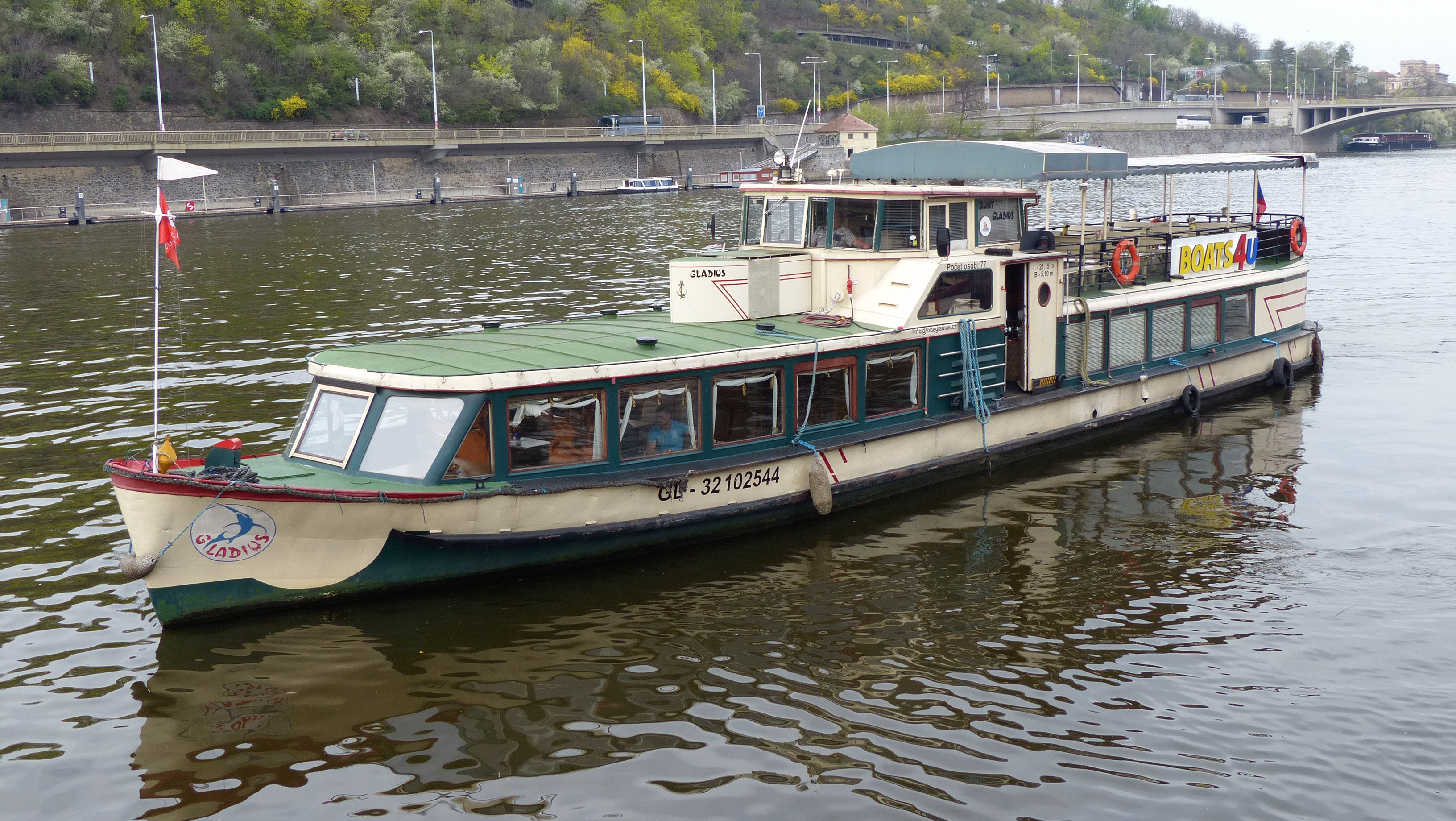 Vltava, Praha